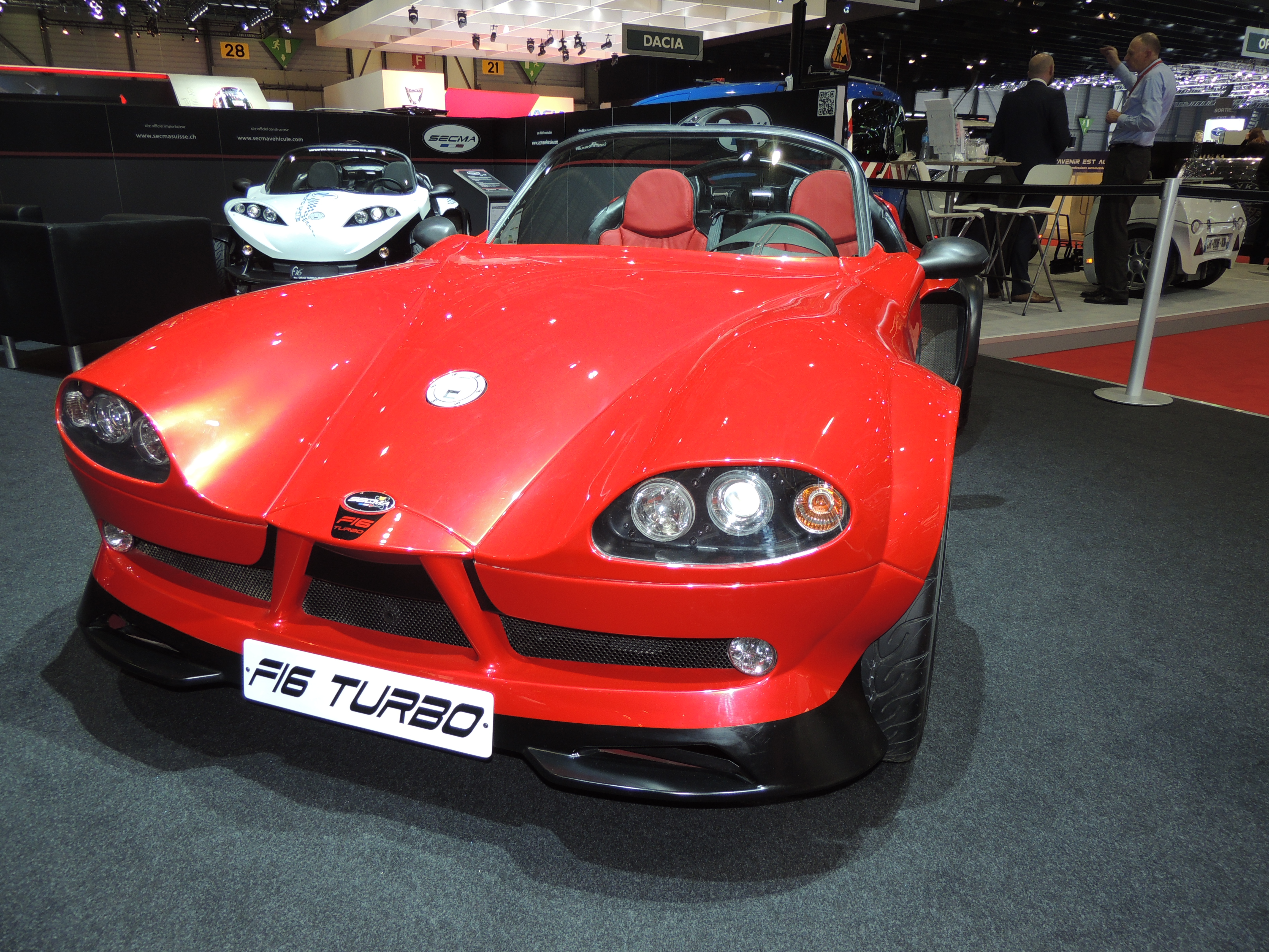 SECMA automobile F16 Turbo, salon de Genève 2016